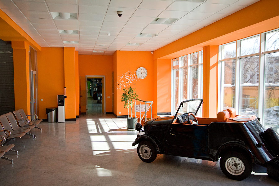 Фойе Российской государственной библиотеки для молодёжи (РГБМ)